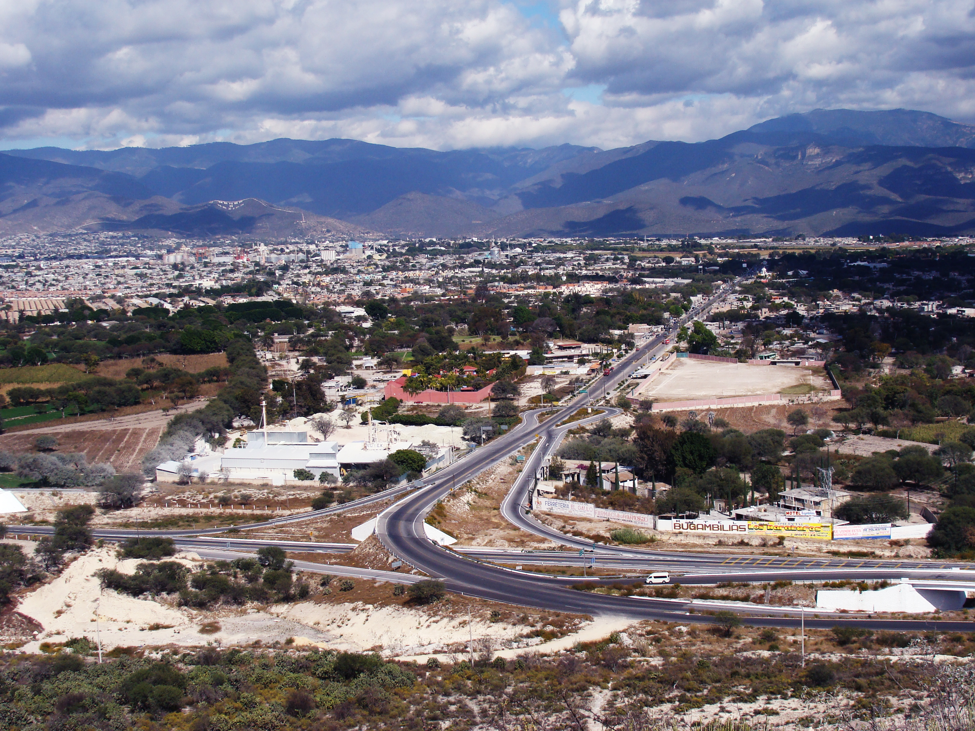 vista de la ciudad de Tehuacán puebla